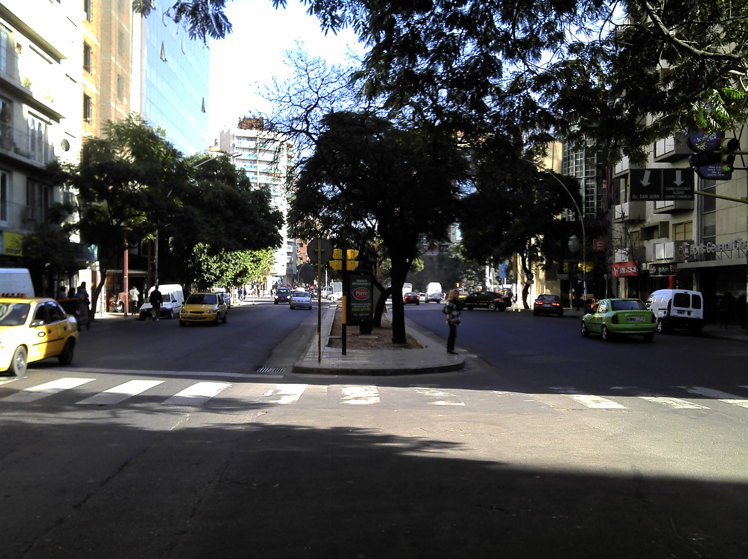 Bv. San Juan, Córdoba, Argentina